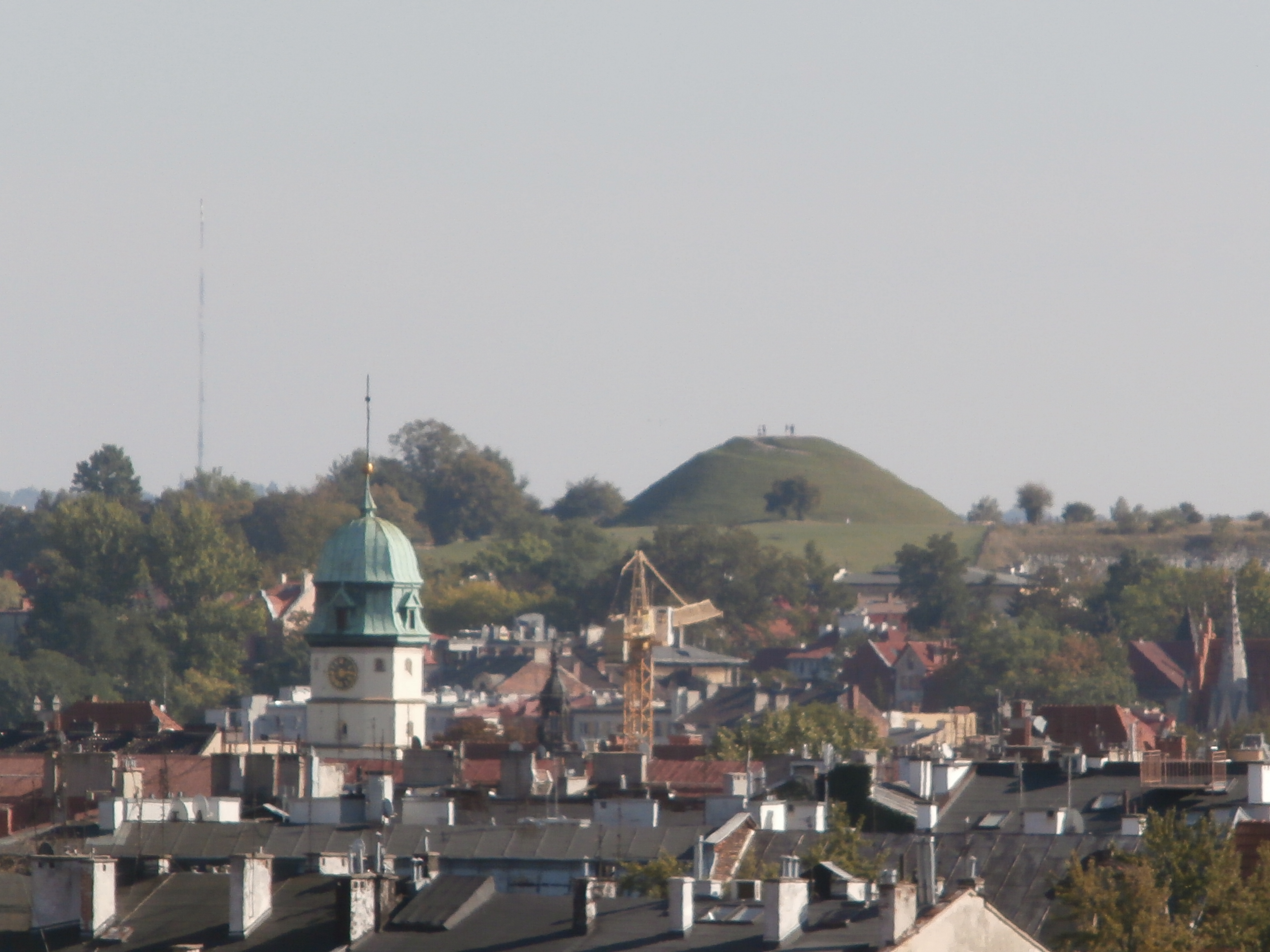 Widok na Kopiec Kraka z Wawelu.